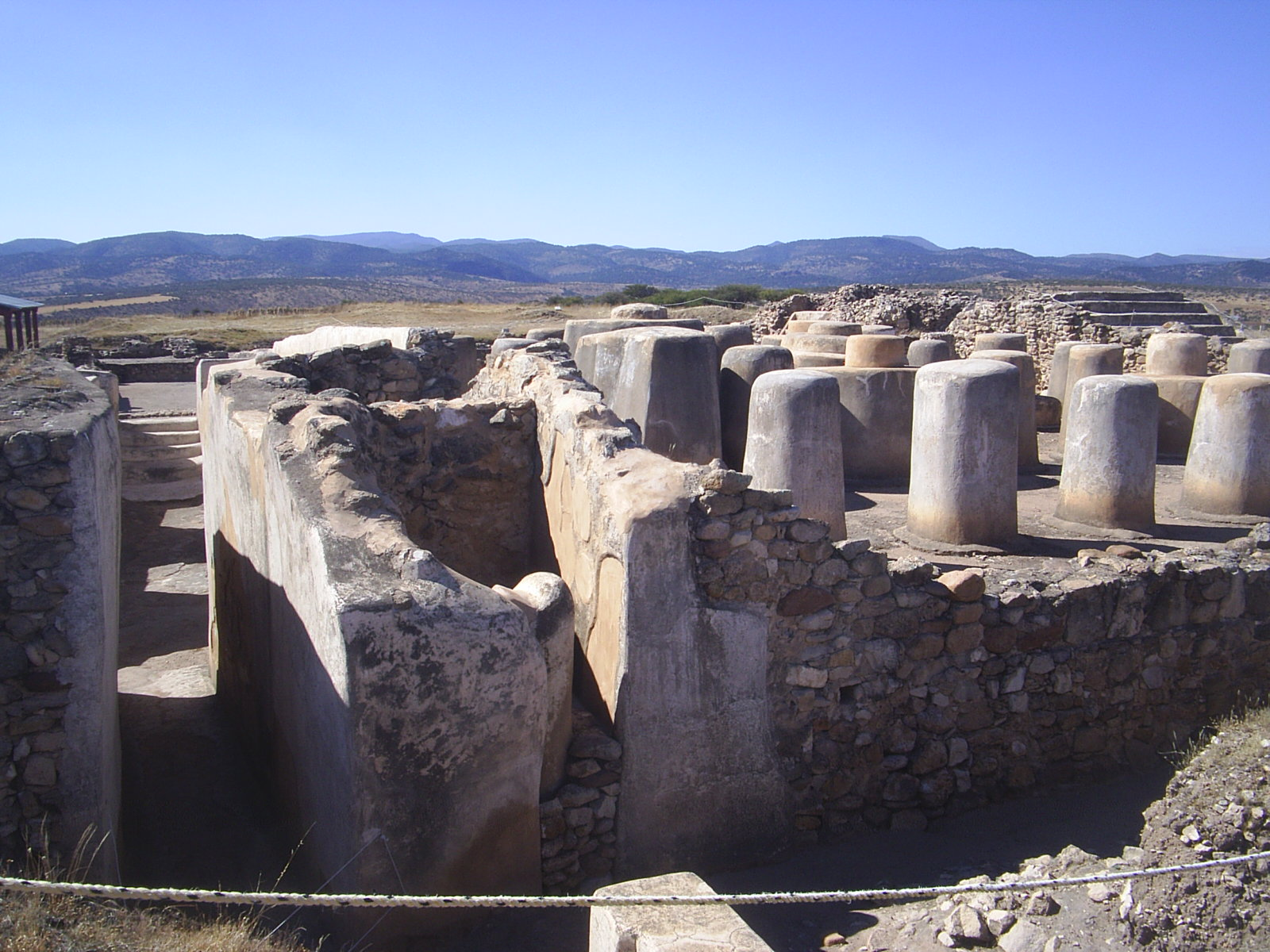 El Laberinto en la zona arqueológica Altavista en Chalchihuites, Zacatecas